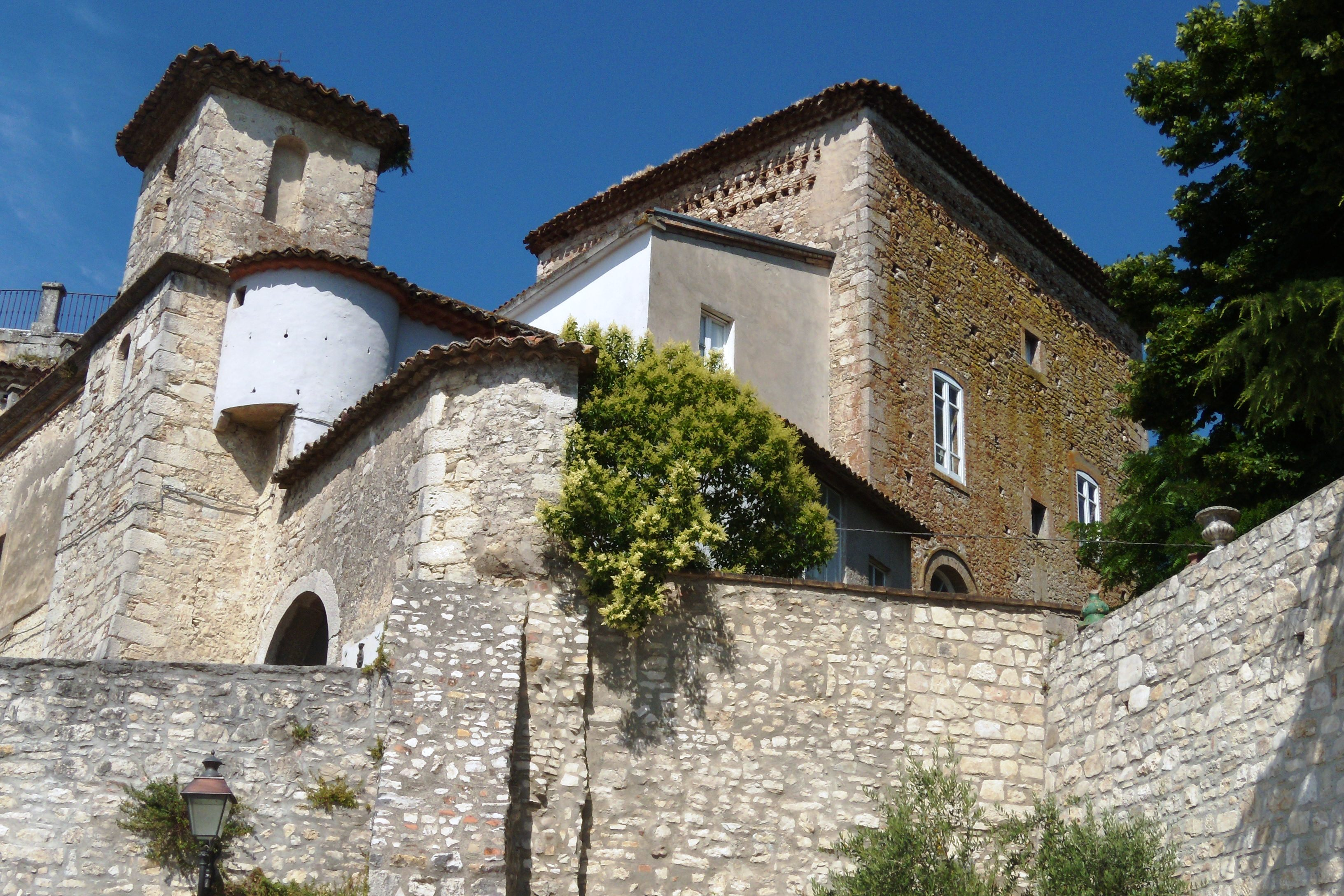 Particolare del castello medievale di Campolattaro (Benevento - Italia).